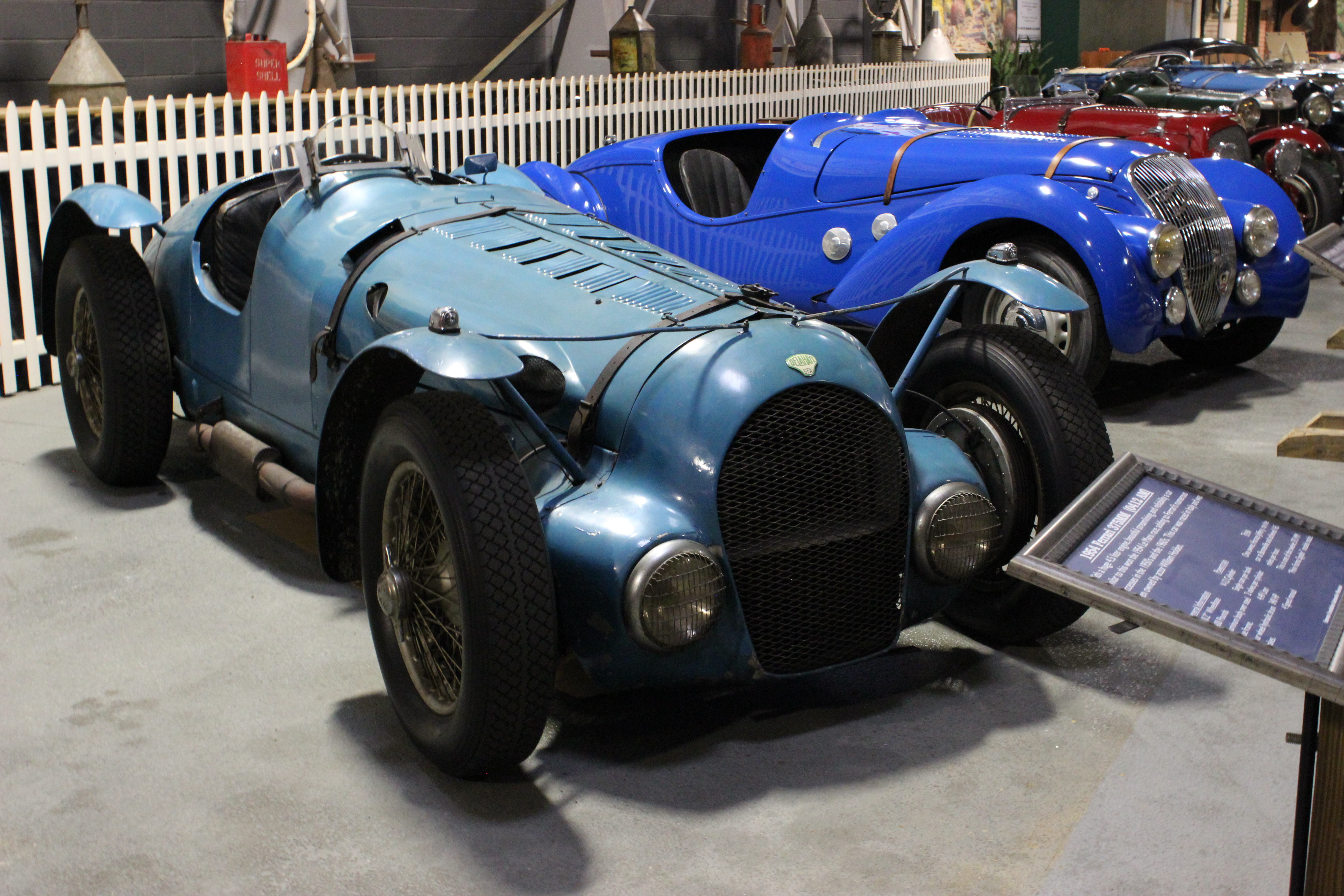 Delahaye 135 S/195